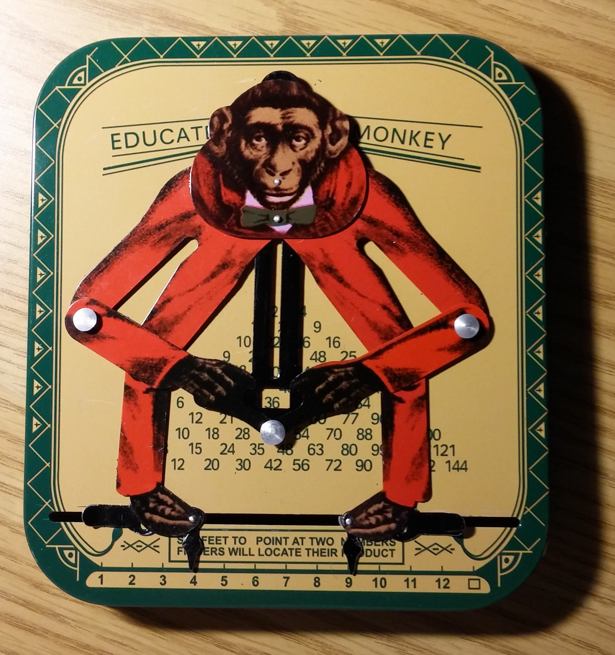 צעצוע מכני משנת 1918 לחישובי לוח הכפל